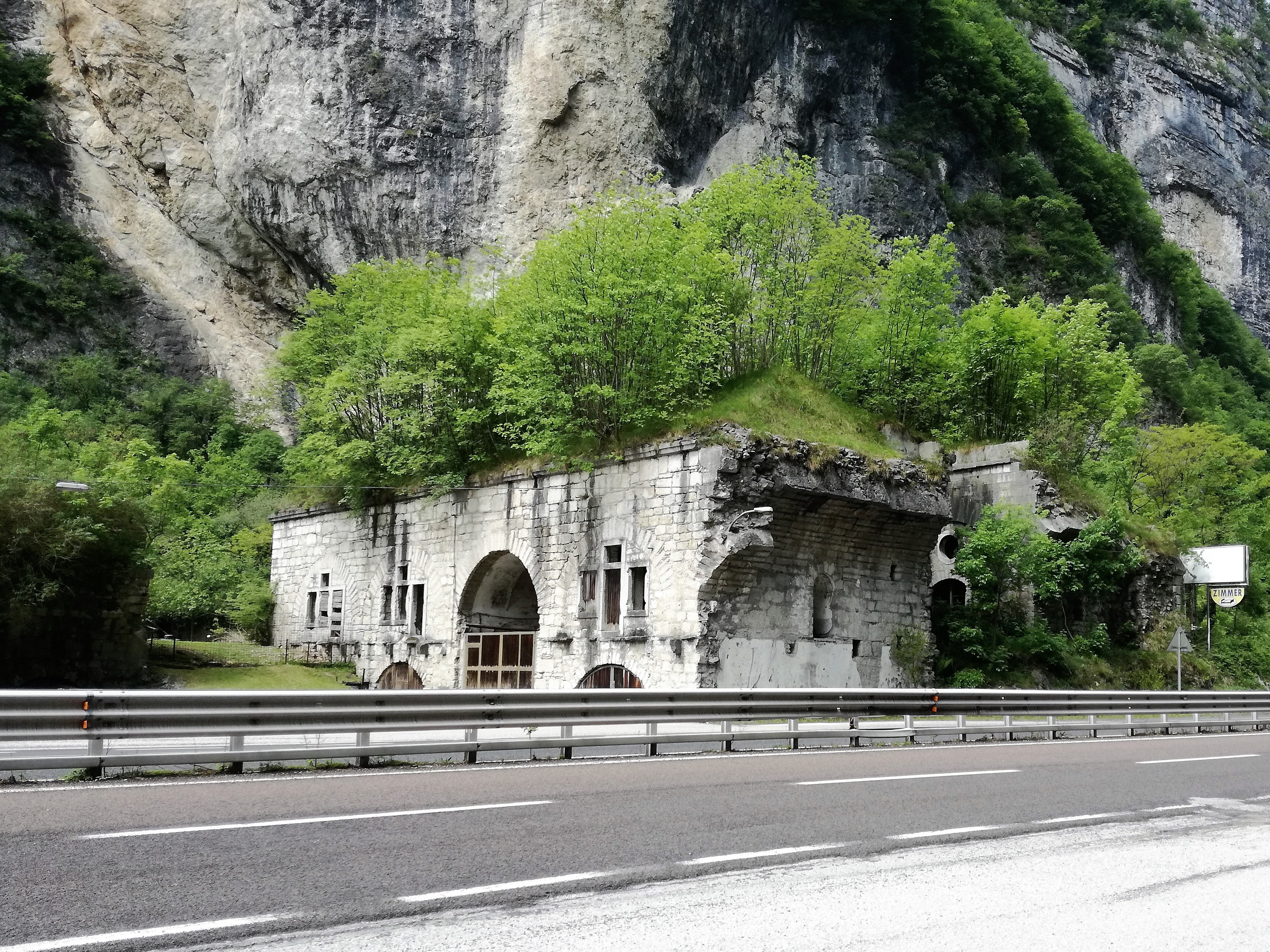 Forte Tombion - Reste der Unterkunftskasematte